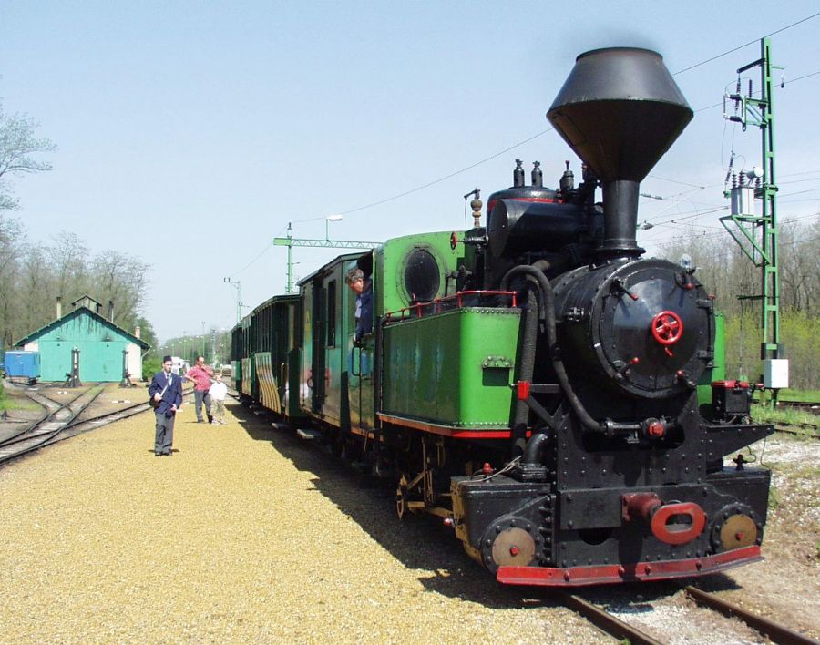 A Nagycenki Széchenyi Múzeumvasút szerelvénye és az András nevű gőzmozdony a fertőbozi végállomáson